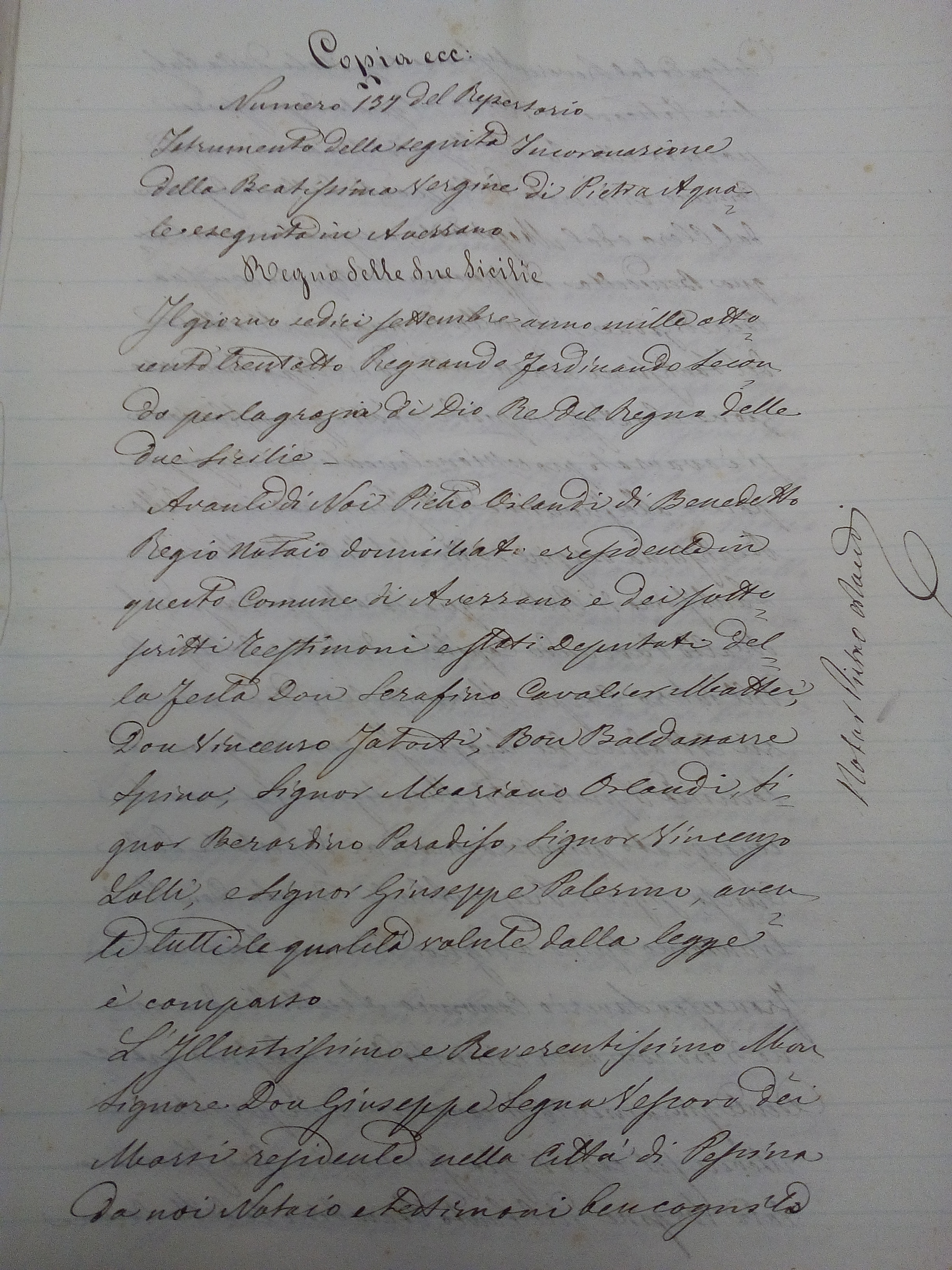 Copia dell'atto di notorietà per la incoronazione della Madonna di Pietraquaria rogato nel 1838